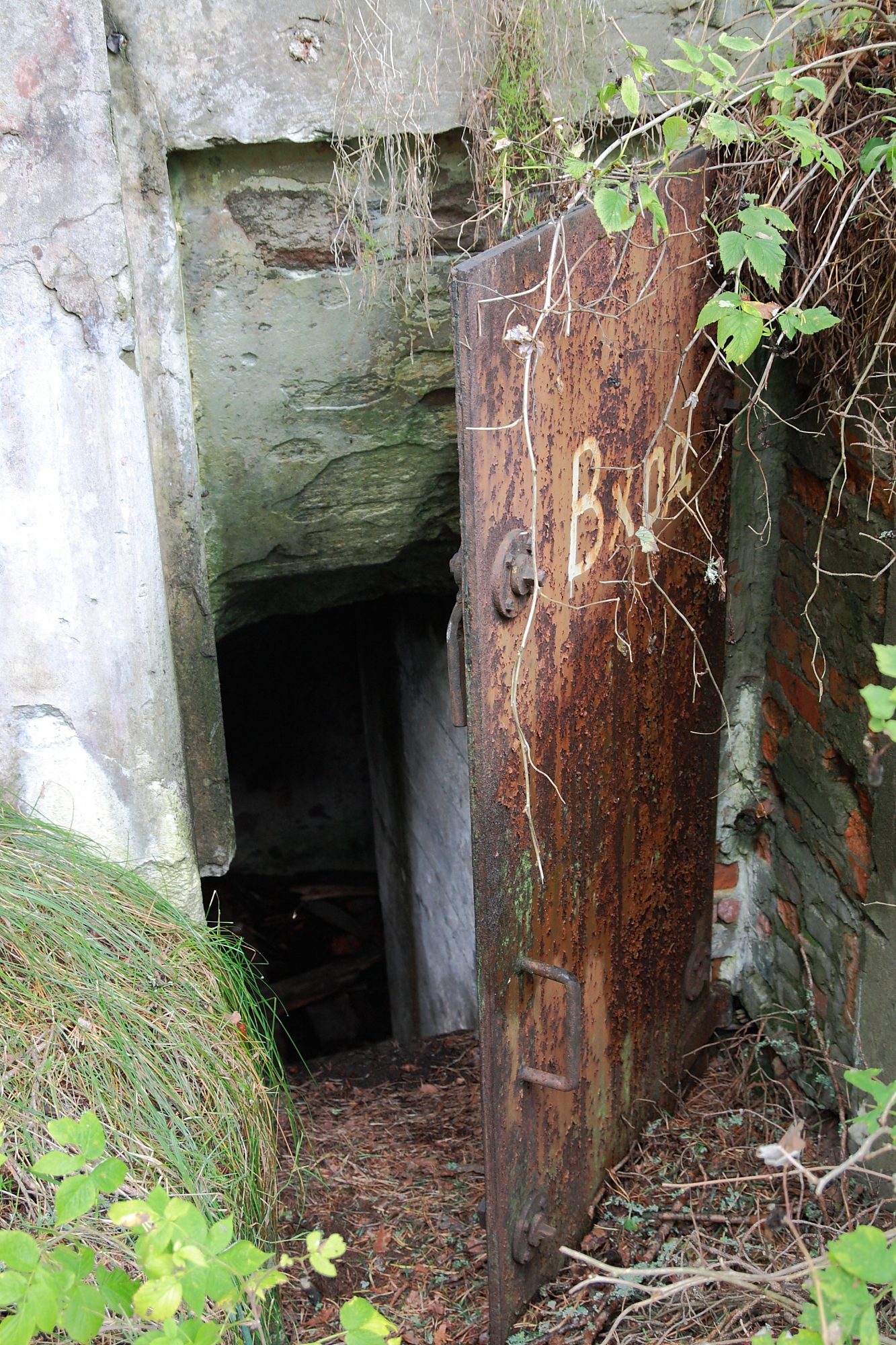 Naissaar, rannapatarei nr 5 (EV nr. 4)